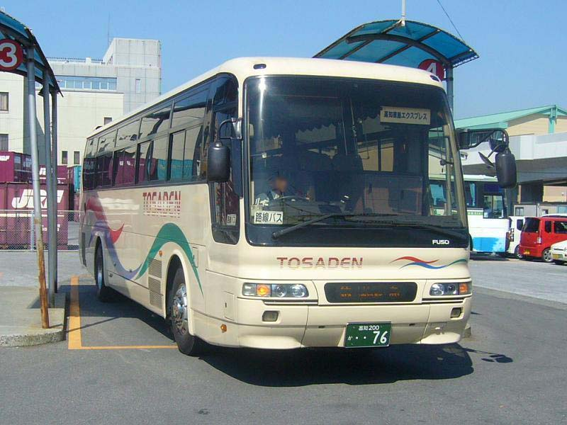 登録番号 高知200か76 土佐電気鉄道所属 龍馬エクスプレス号用 2006年4月8日 高知駅前にて撮影 撮影者 Tokatsu kokubu